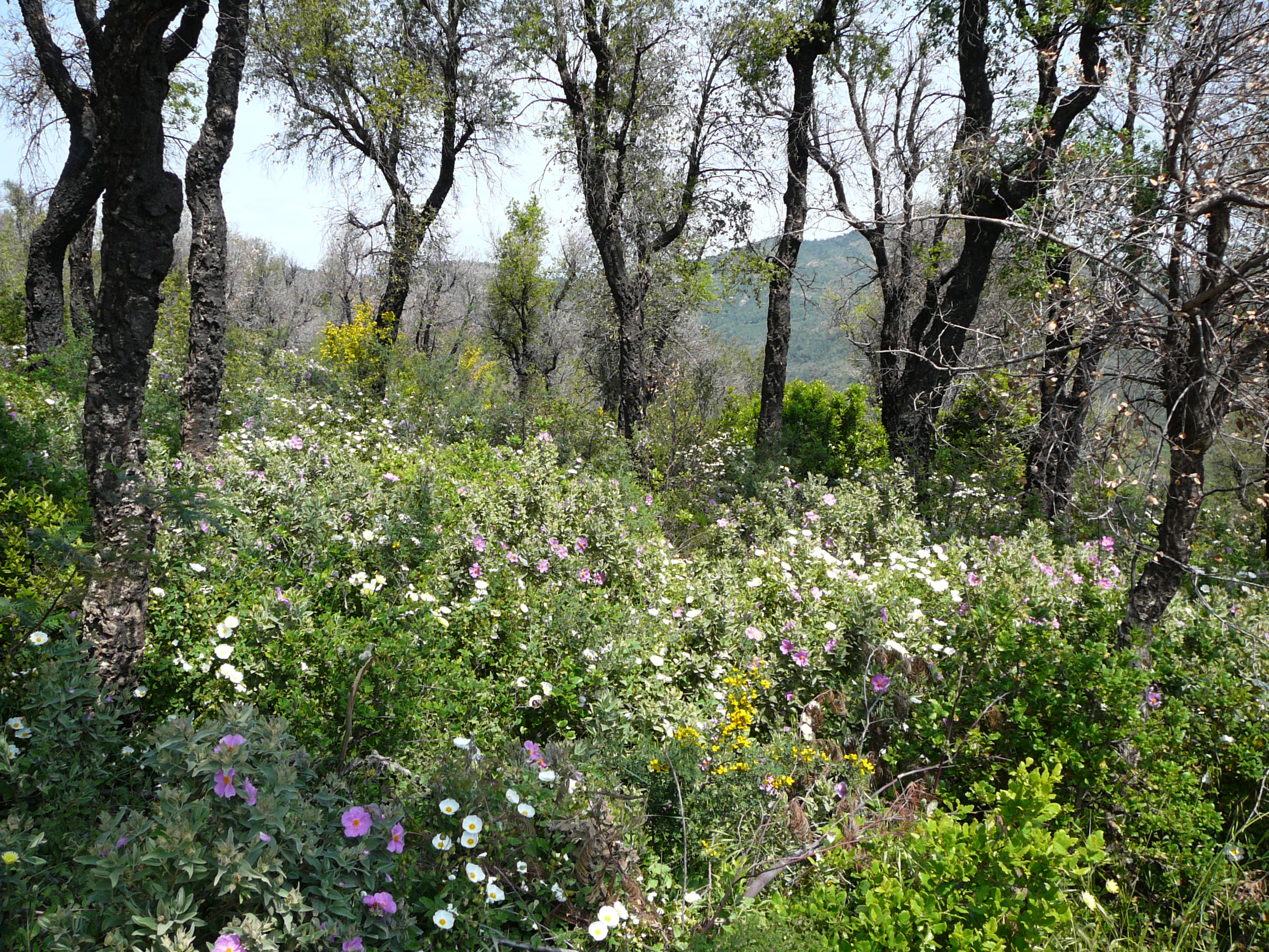 Cistes, lavandes et chênes-liège dans les hauteurs de Sainte-Maxime.